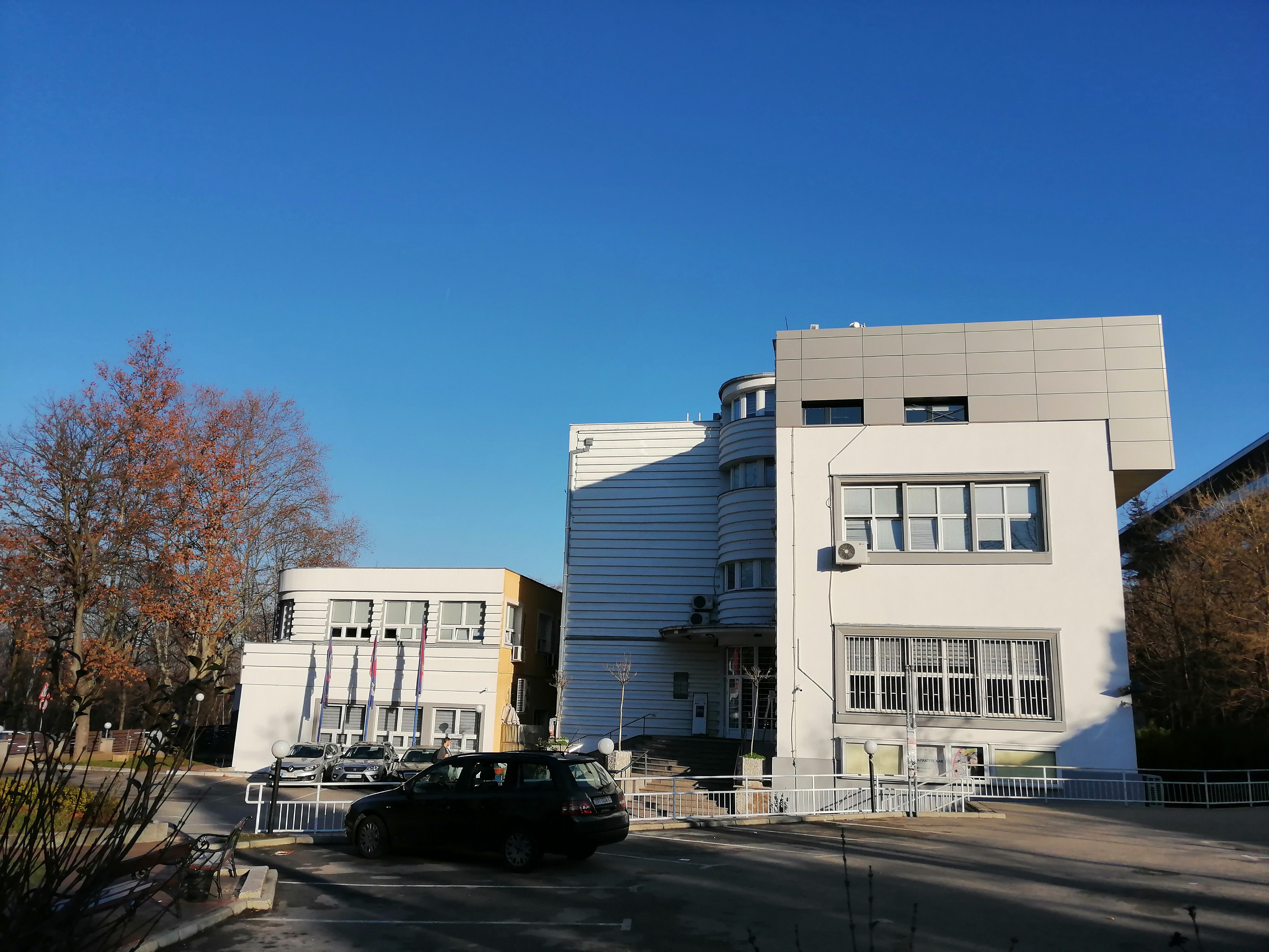 Fakultet organizacionih nauka, Beograd